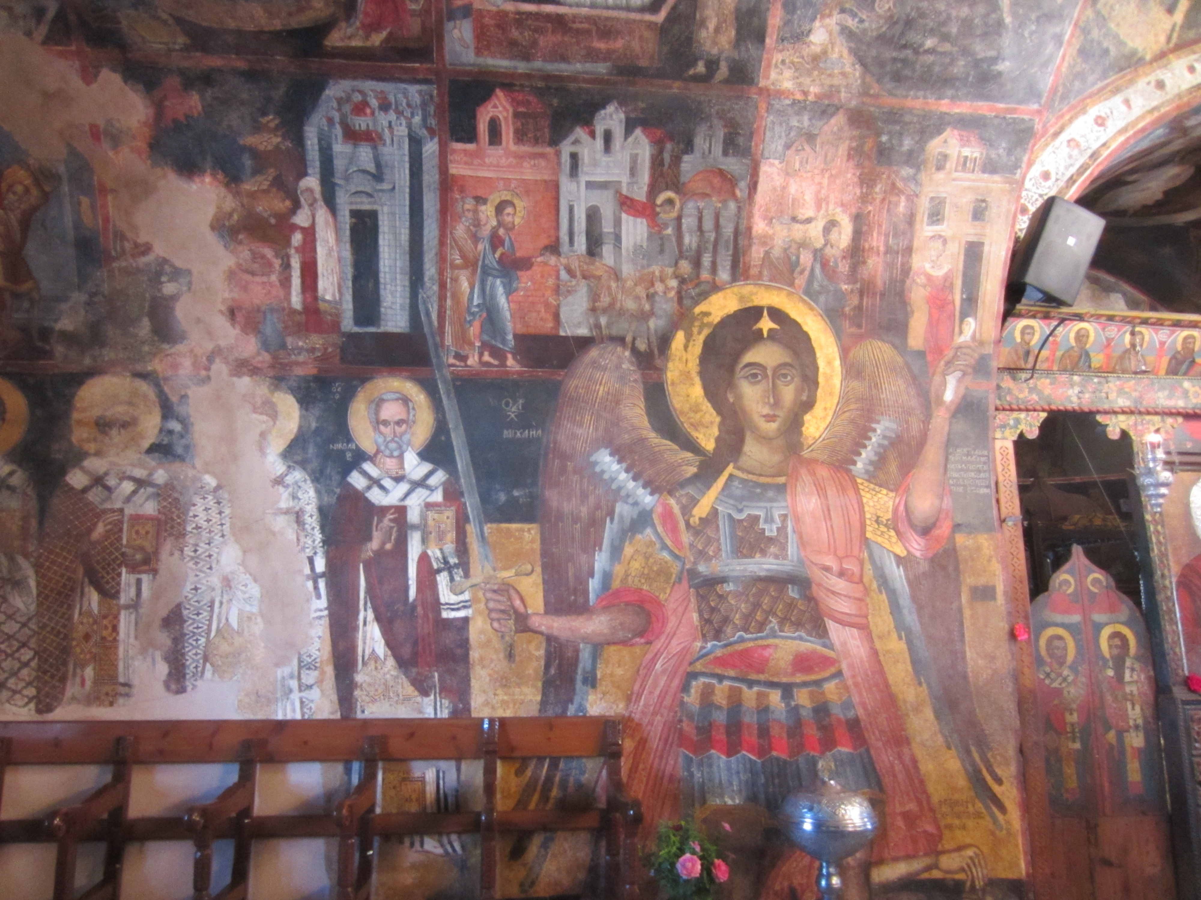 Церковь Успения Богородицы в Асклипио